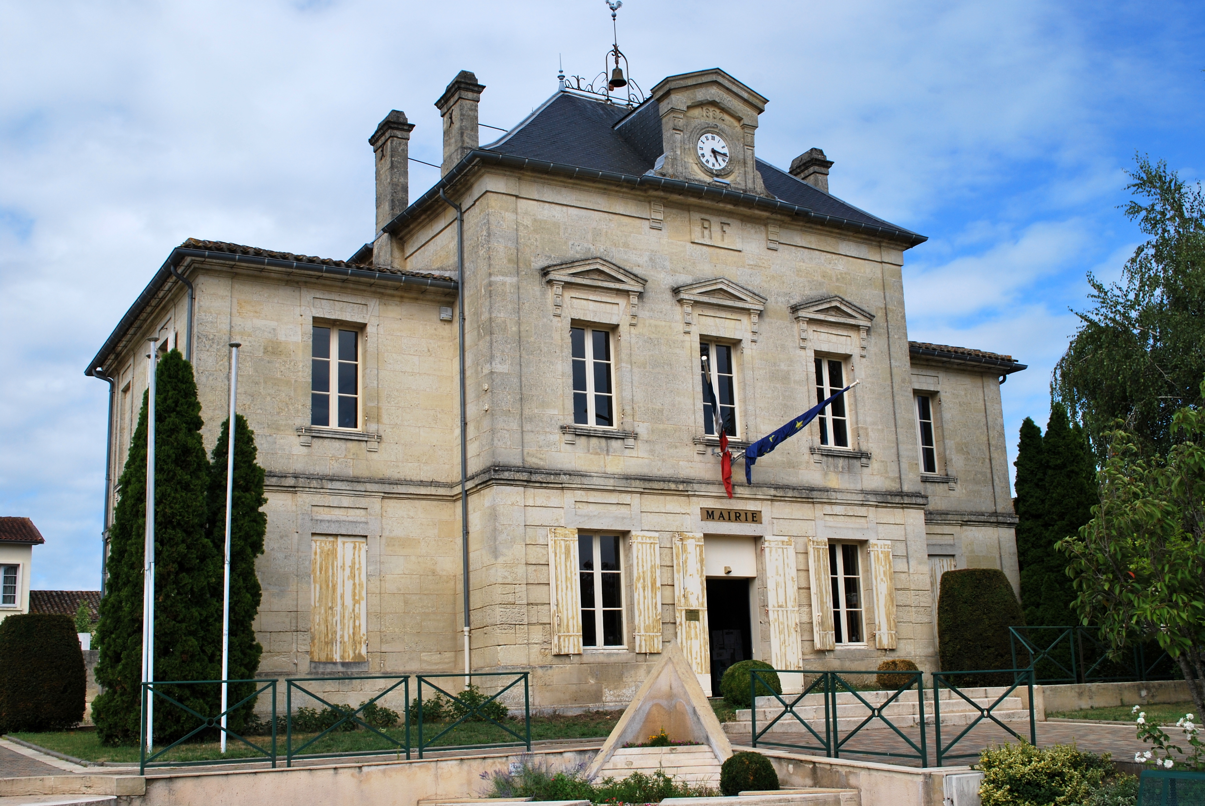 Saint-Germain-du-Puch Mairie